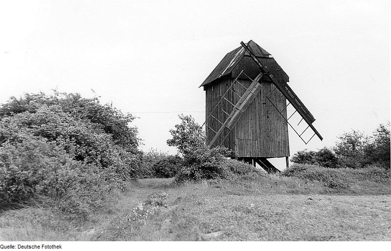 Original image description from the Deutsche Fotothek Belzig-Borne. Bockmühle, Baujahr 1803